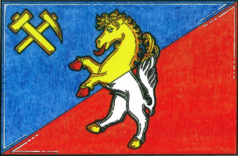 vlajka, Nová Ves pod Pleší, okres Příbram